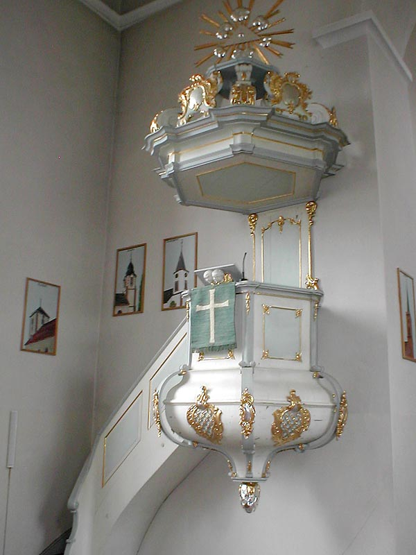 Schmuckvolle barocke Kanzel in der ev. Kirche in Reichartshausen